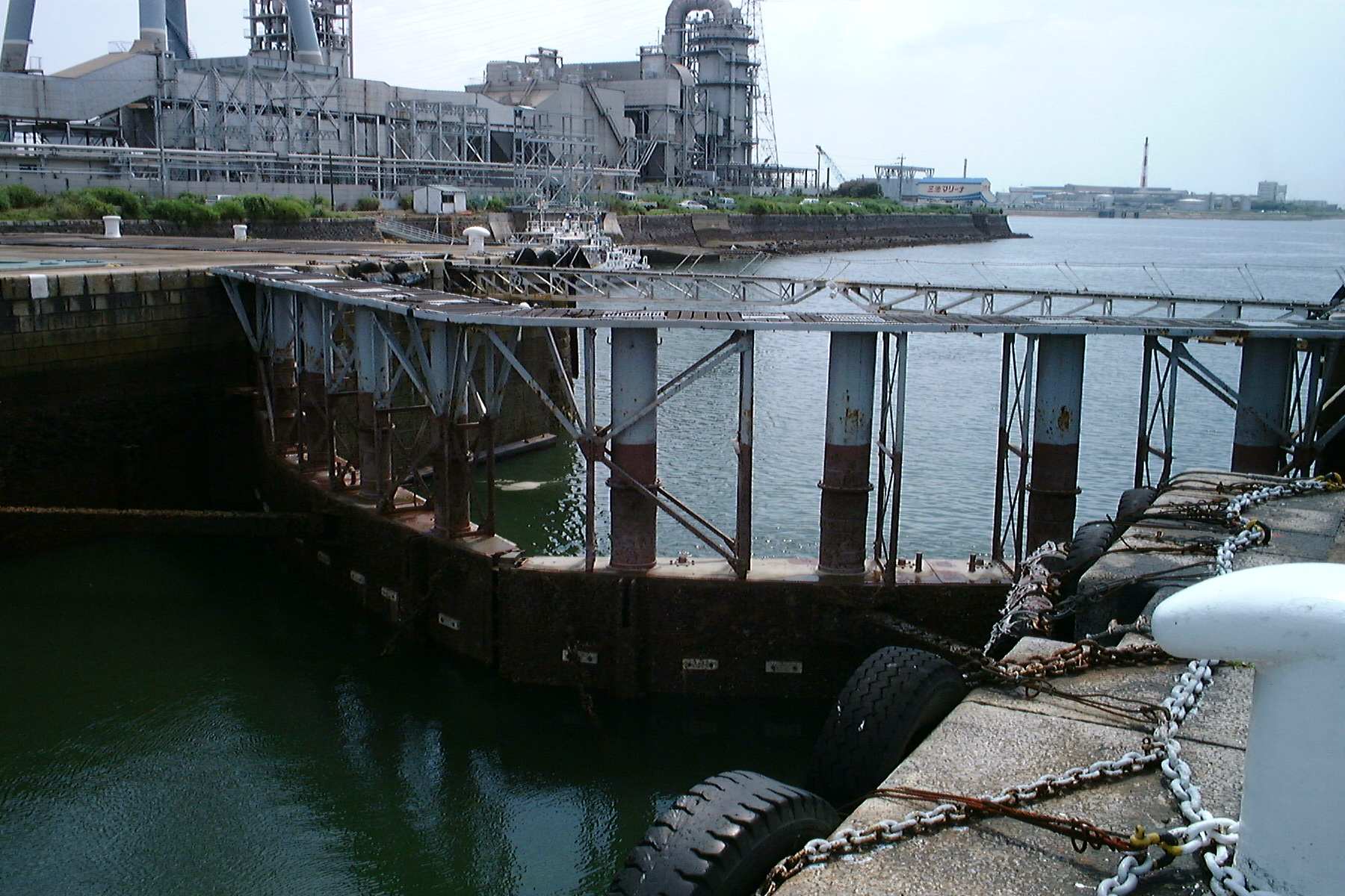 福岡県大牟田市に所在する三池港の閘門。三池港は明治41(1908)年に完成した人工の港で、遠浅の有明海の激しい干満差を解消して大型船が常時停泊できるよう設けられた。100年以上を経て現役で稼働している。